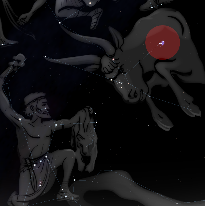 Plejaden (roter Kreis) im Sternbilder Stier, das Sternbild links unten ist Orion